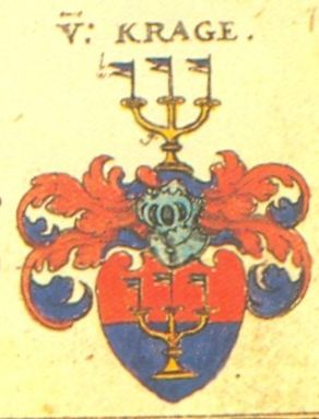 Coat of Arms, Krage Family, Meissen Saxony (from: Johann Siebmacher: New Wappenbuch, scan from: Horst Appuhn, Johann Siebmachers Wappenbuch. Die bibliophilen Taschenbücher 538, 2. verb. Aufl , Dortmund 1989 Meißner, Blatt 151)